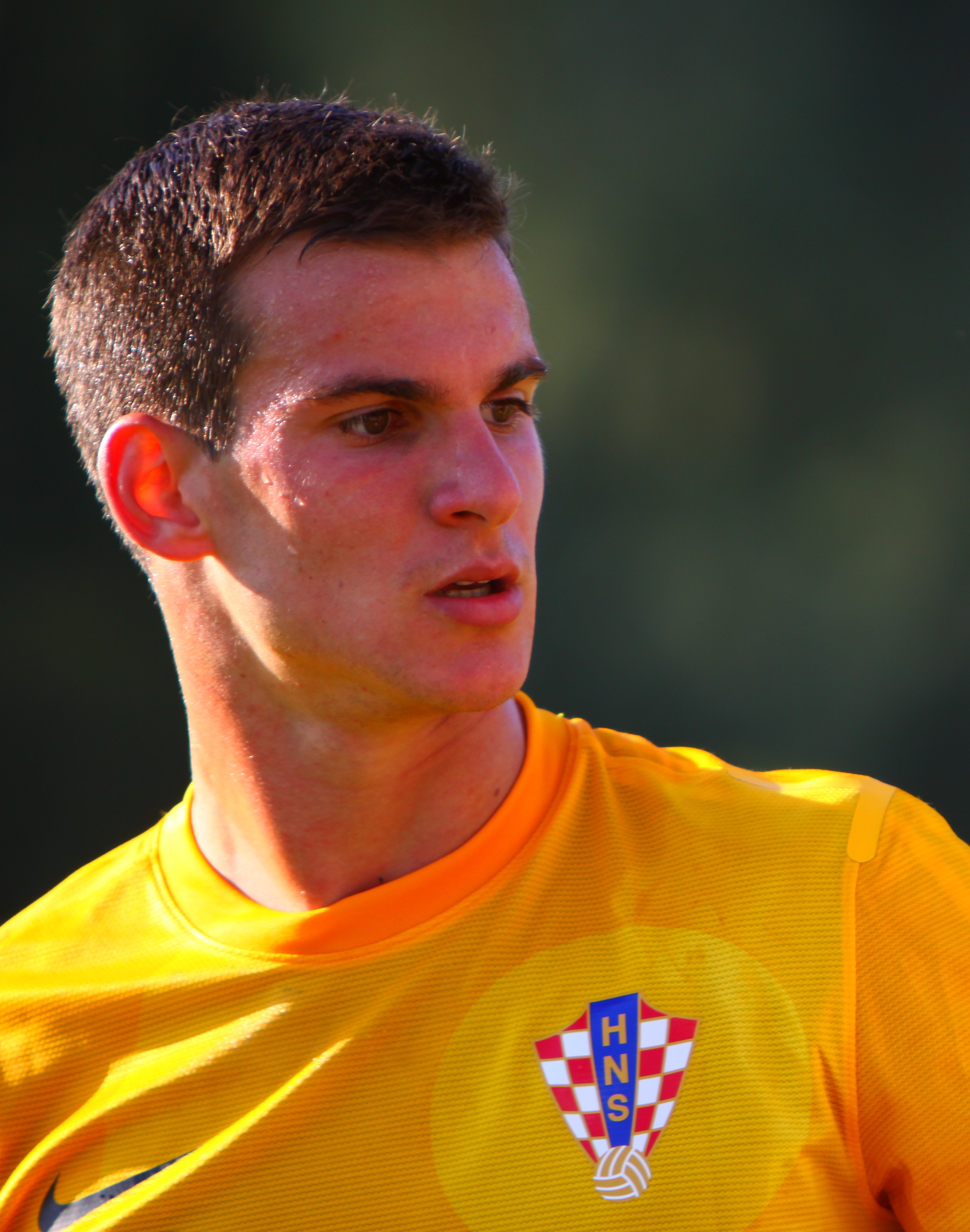 Simon Sluga